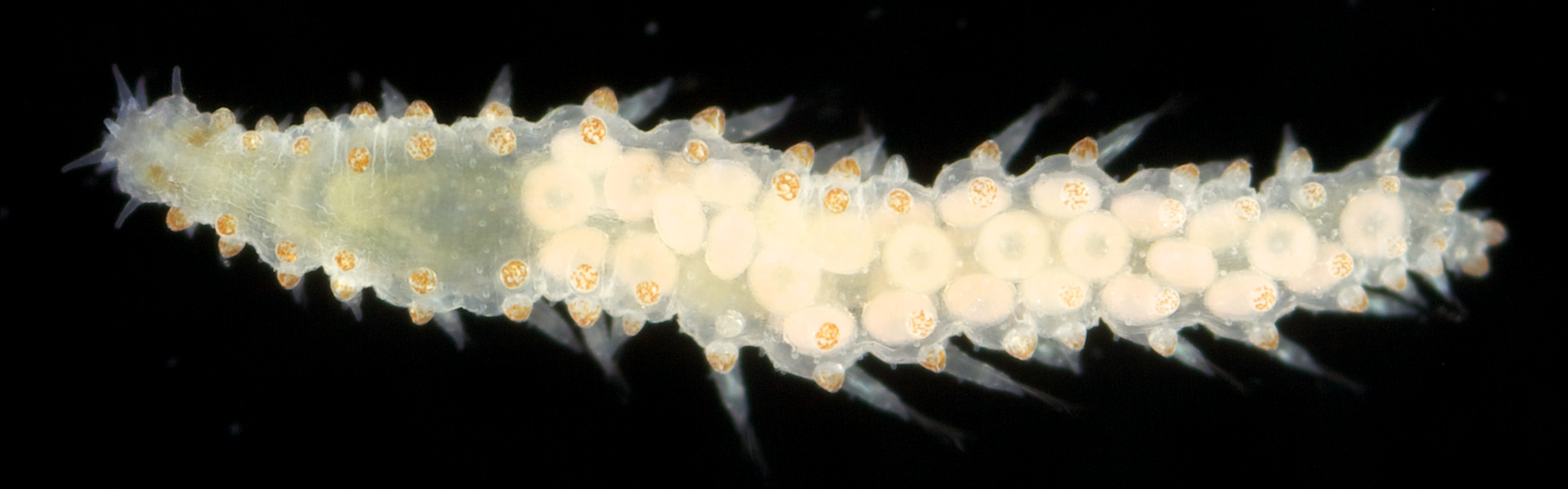 Sphaerodoropsis philippi, Samlet inn fra Barentshavet, kun 2-3 mm i lengde. En hunn fylt med egg.